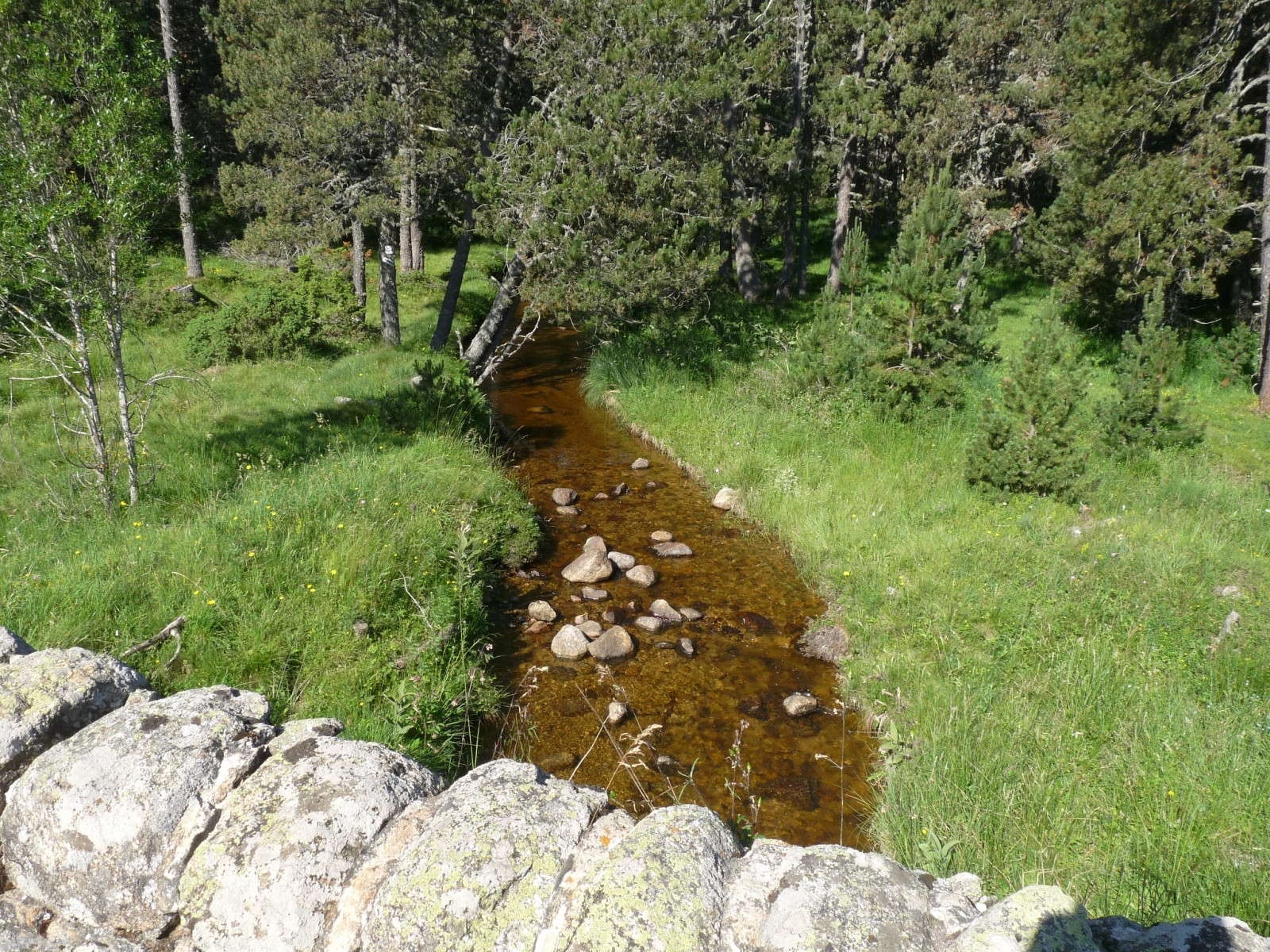 L'Aude vue vers l'amont, Les Angles, Pyrénées-Orientales, France. Premier endroit où l'Aude croise une route depuis sa source.